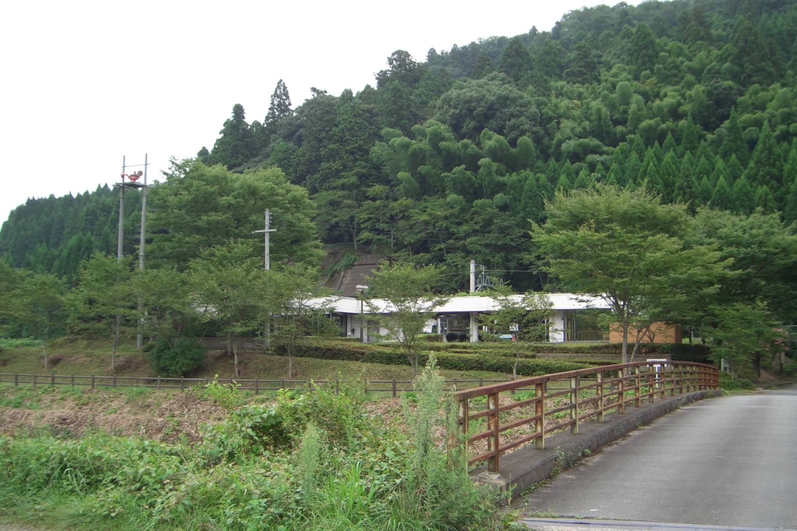 北近畿タンゴ鉄道宮福線二俣駅。俊明公民館。